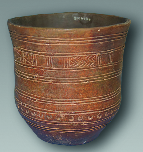 Jungsteinzeitlicher Glockenbecher, Fundort Grebenau, Ausstellung in oberhessisches Museum Gießen